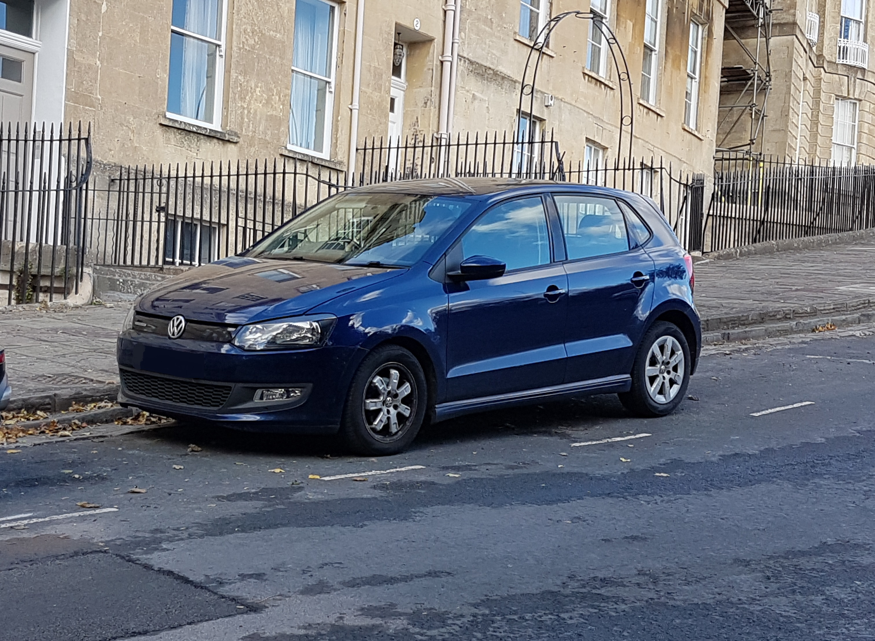 Volkwagen Polo V Bluemotion à Bath